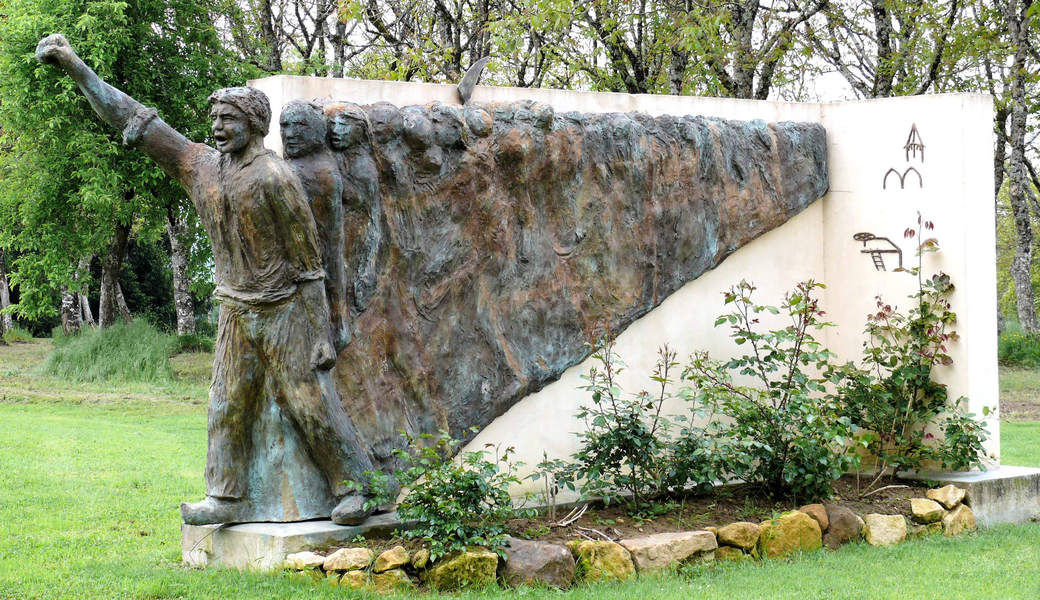 Capdrot - Monument des Croquants